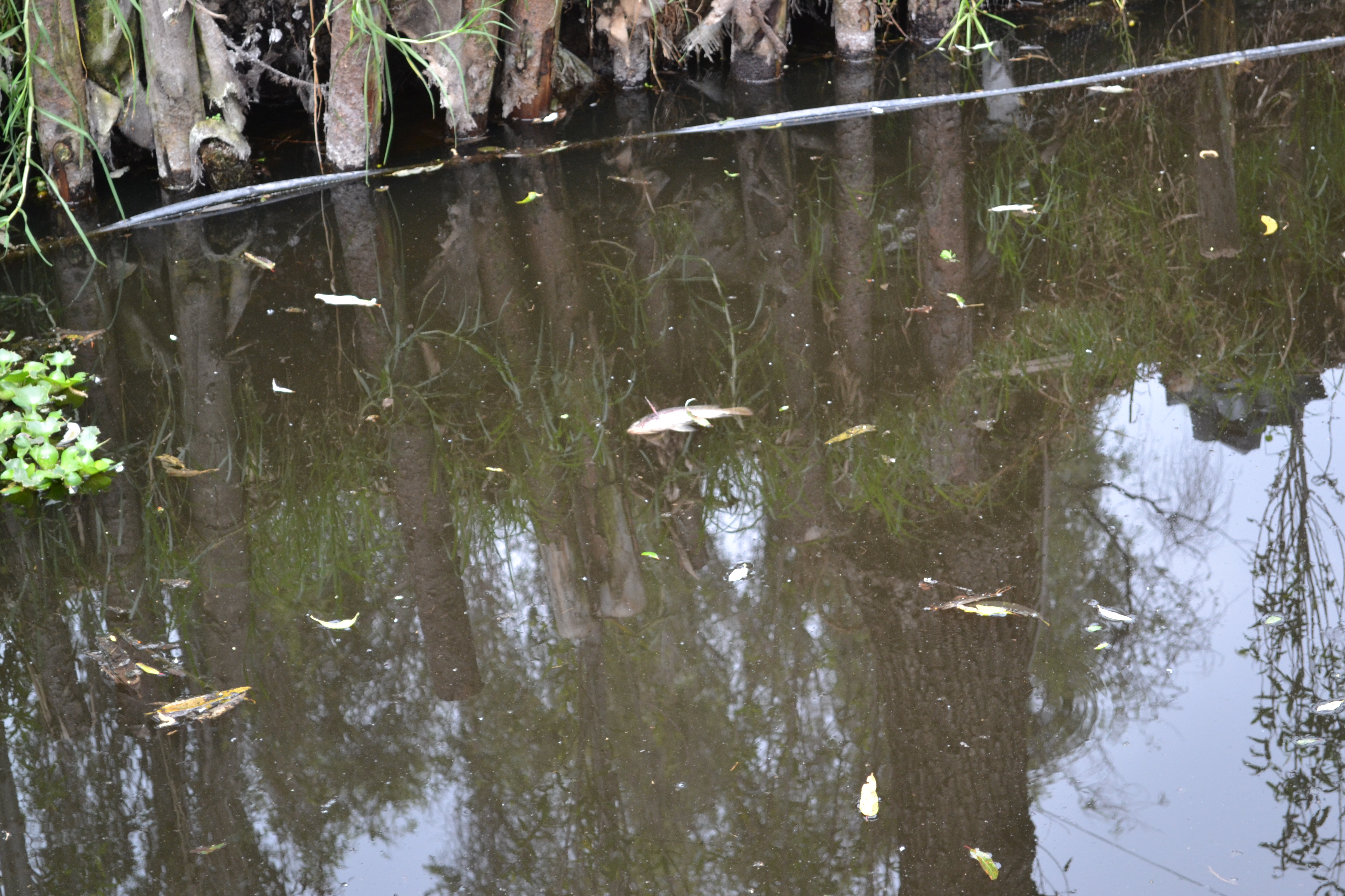 En la foto se presentan peces muertos por los niveles de contaminación del canal de Xochimilco.